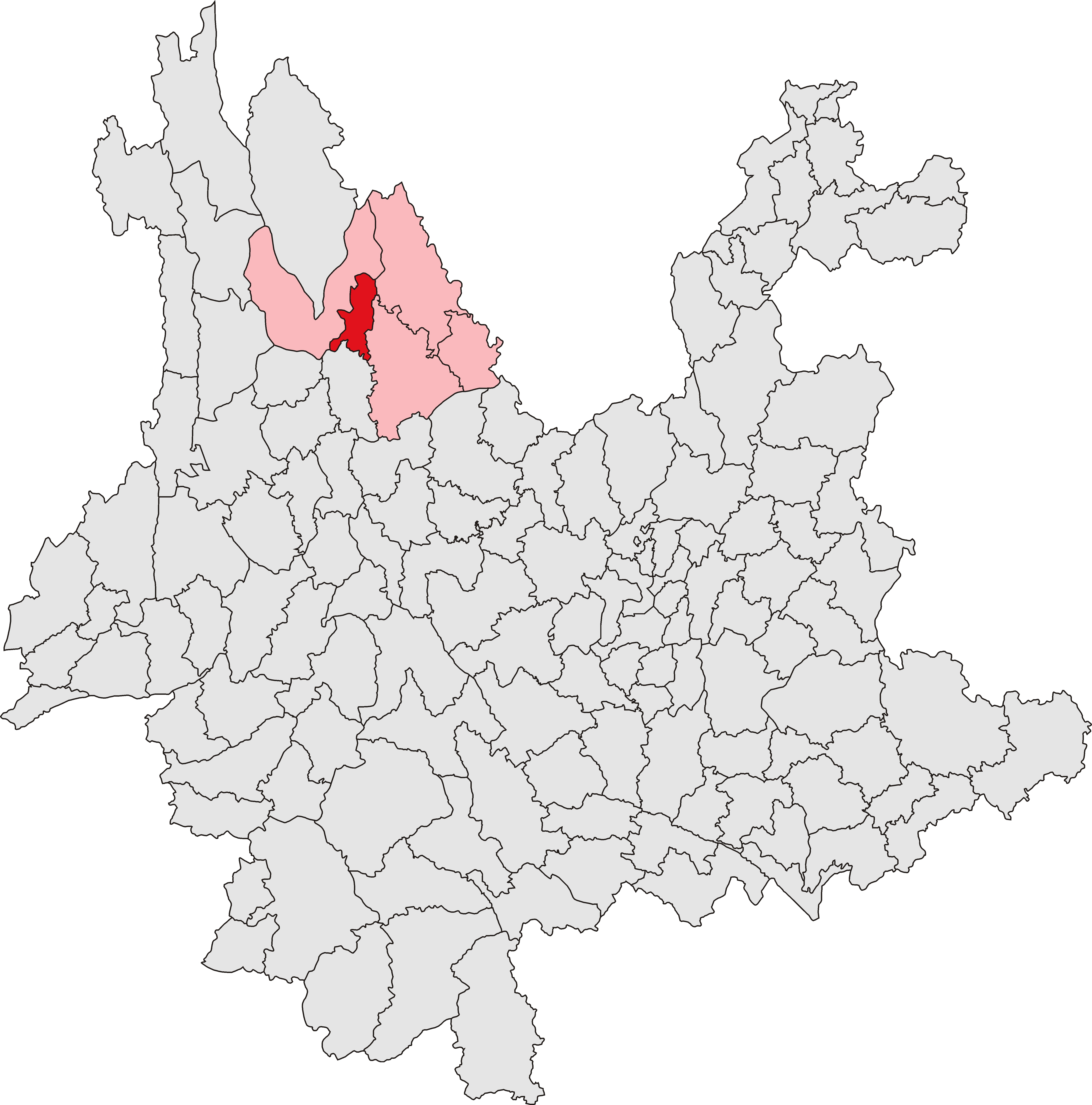 中文（中国大陆）: 古城区位置图